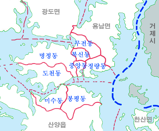 통영시내 지도